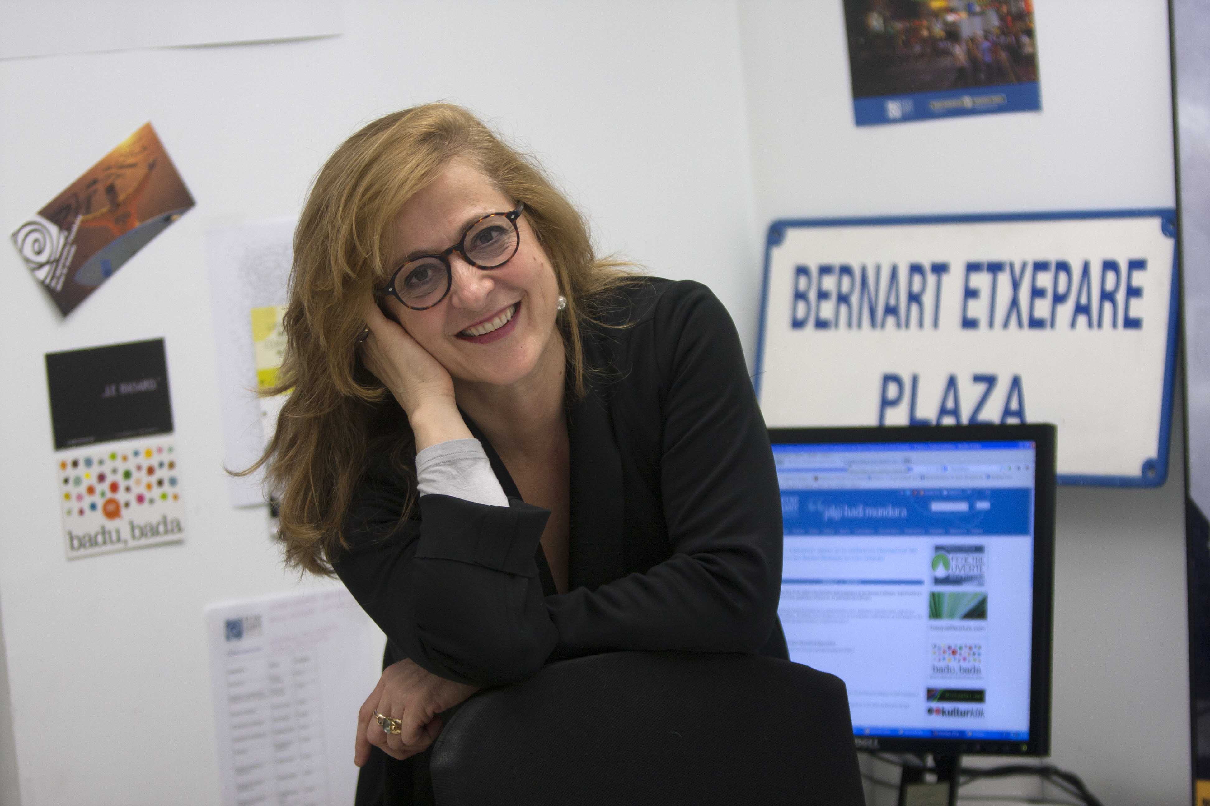 Aizpea Goenaga